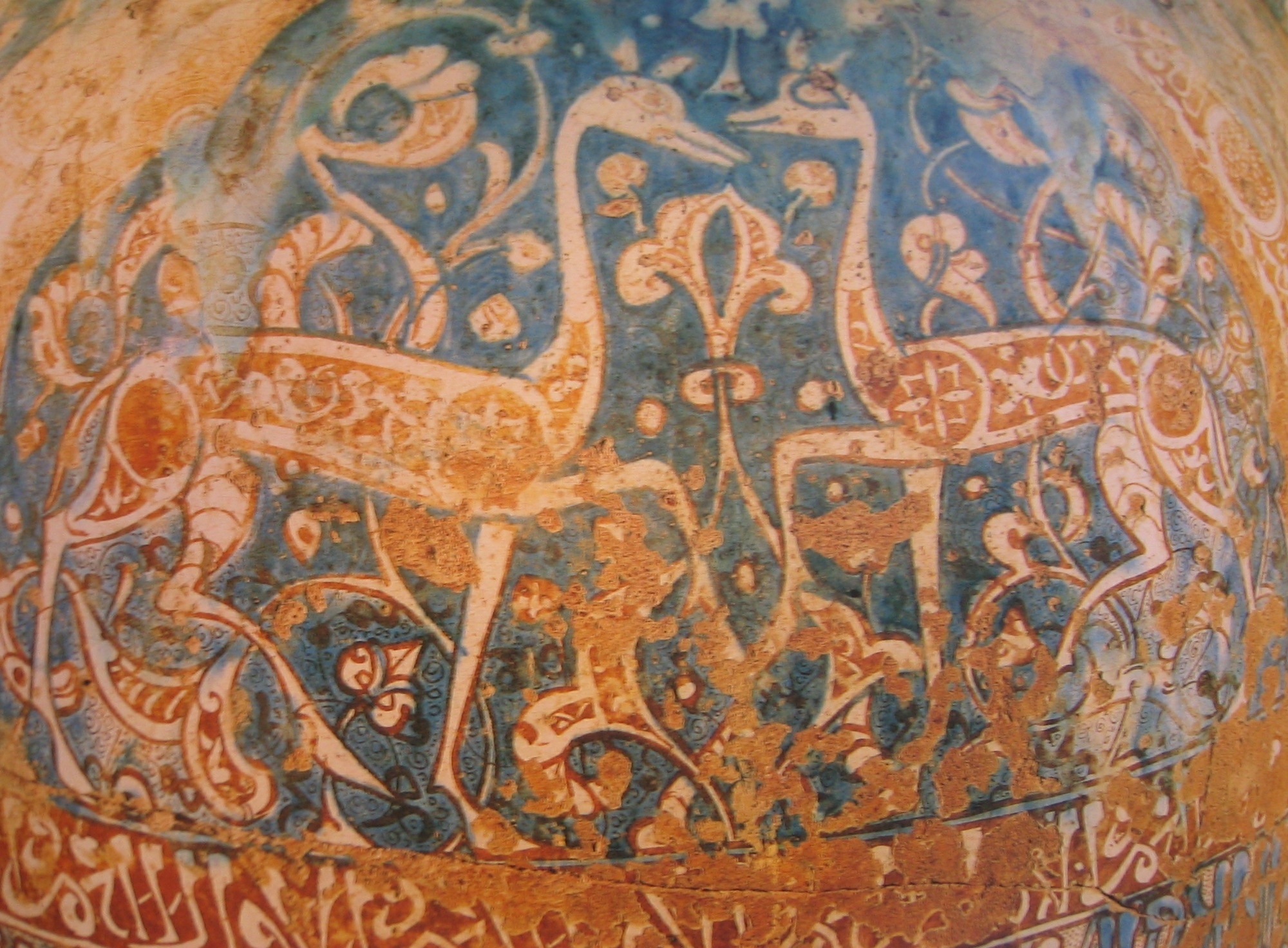 Detalle del llamado Jarrón de las Gacelas, obra maestra de la cerámica nazarí. Se encuentra en el Museo de la Alhambra dentro del palacio de Carlos V en La Alhambra de Granada (España). Description: Alhambra gazelle, pottery of Nasrid times, XIIIth century; this is an own picture; it was shot during the visit of Alhambra, Granada, SpainPurpose : al-andalus series of articles, in Wikipédia (FR).Source: Utilisateur:Holycharly Licence